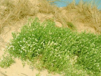 cakile